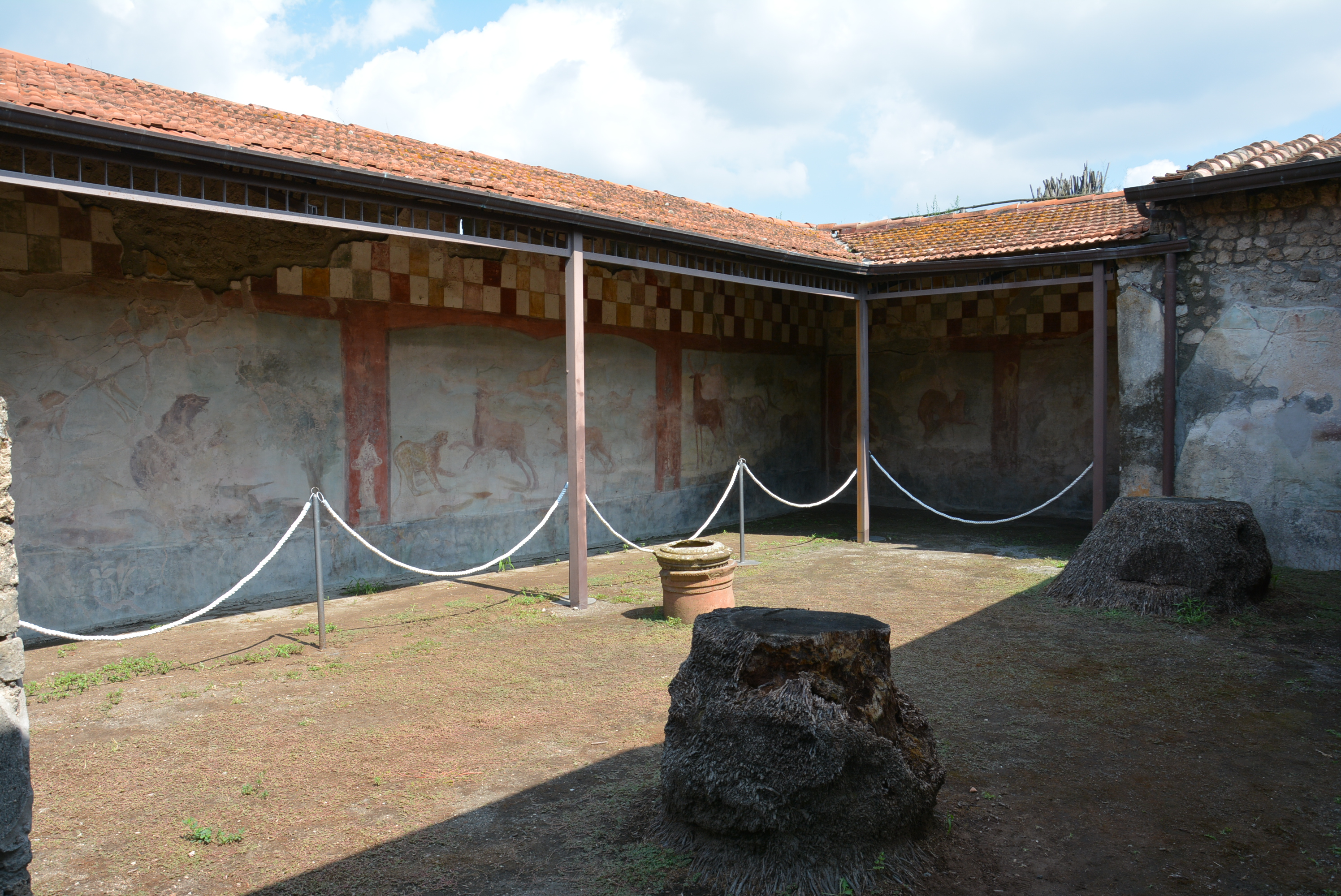 Casa di Marco Lucrezio Frontone - MIBACT This is a photo of a monument which is part of cultural heritage of Italy.